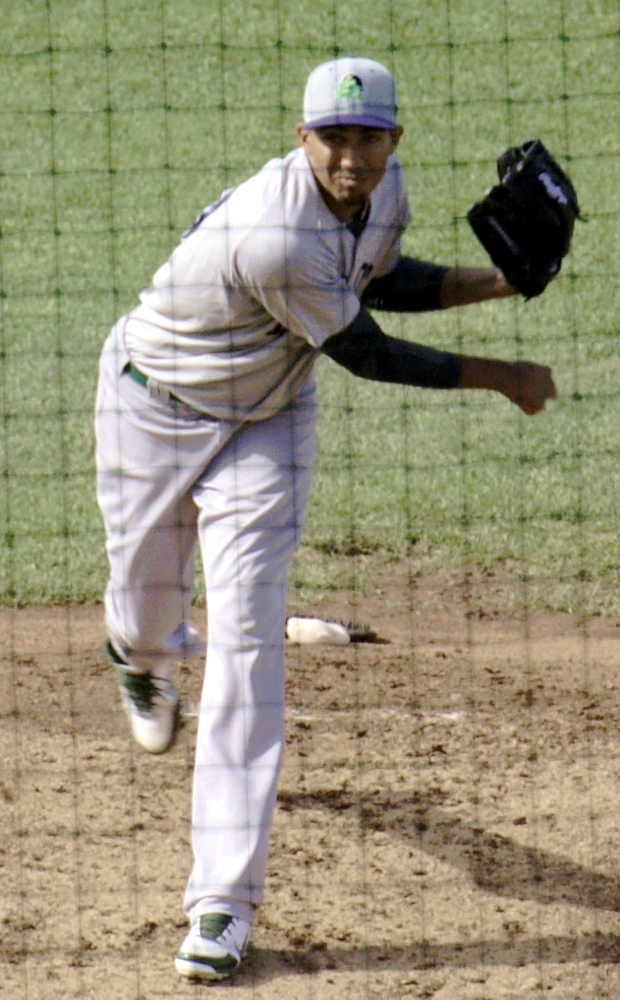 Michael Ynoa